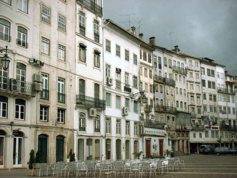 Praça do Comércio de Coimbra. Fotografía realizada por: Ángel Serrano Sánchez de León